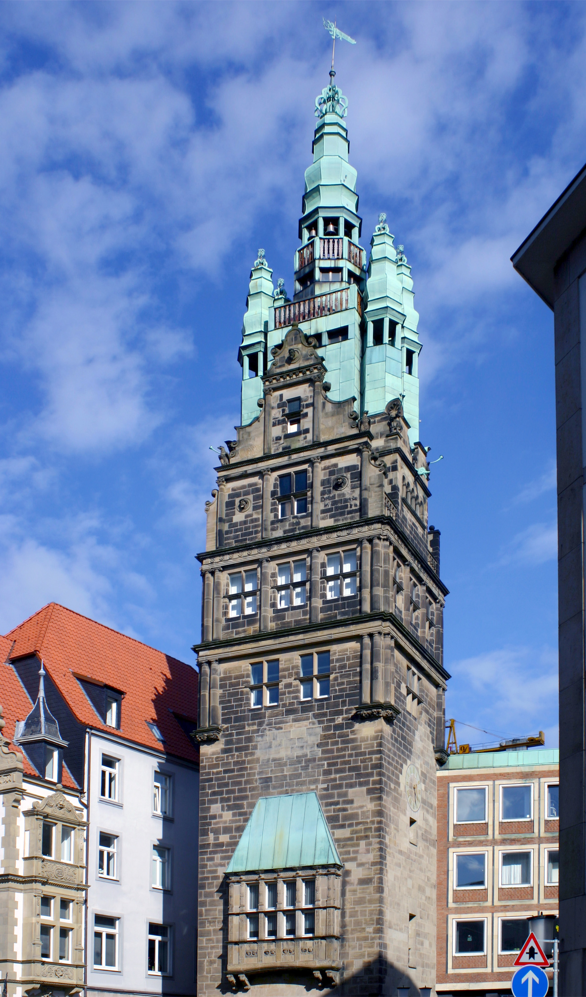 Der Stadthausturm in Münster, Nordrhein-Westfalen, Deutschland.